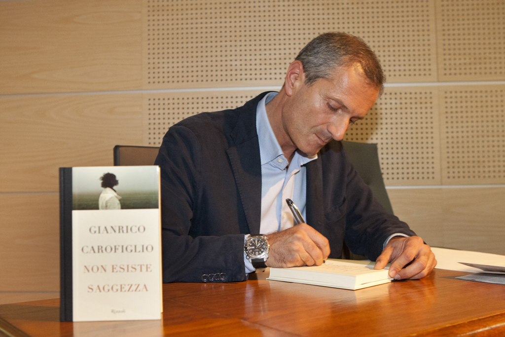 finalepremiochiara_1